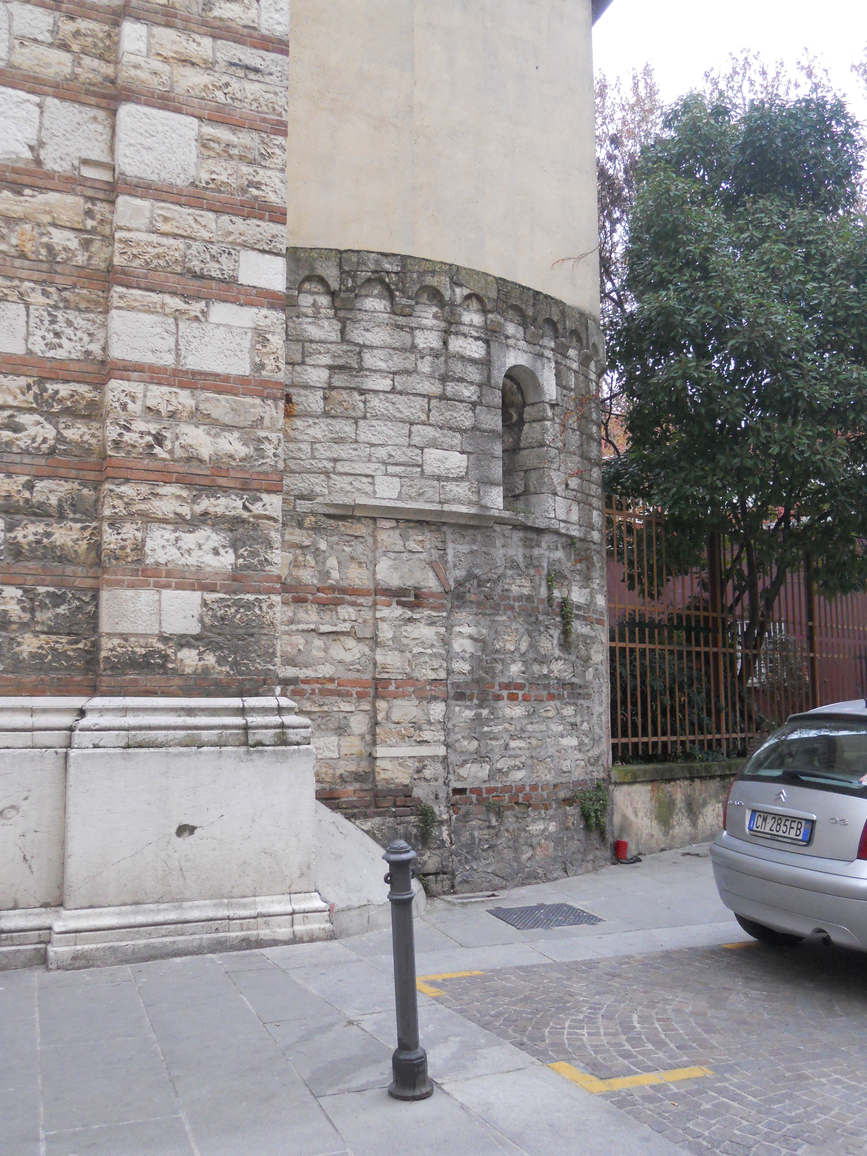 chiesa dei santi giacomo e filippo (Brescia) abside